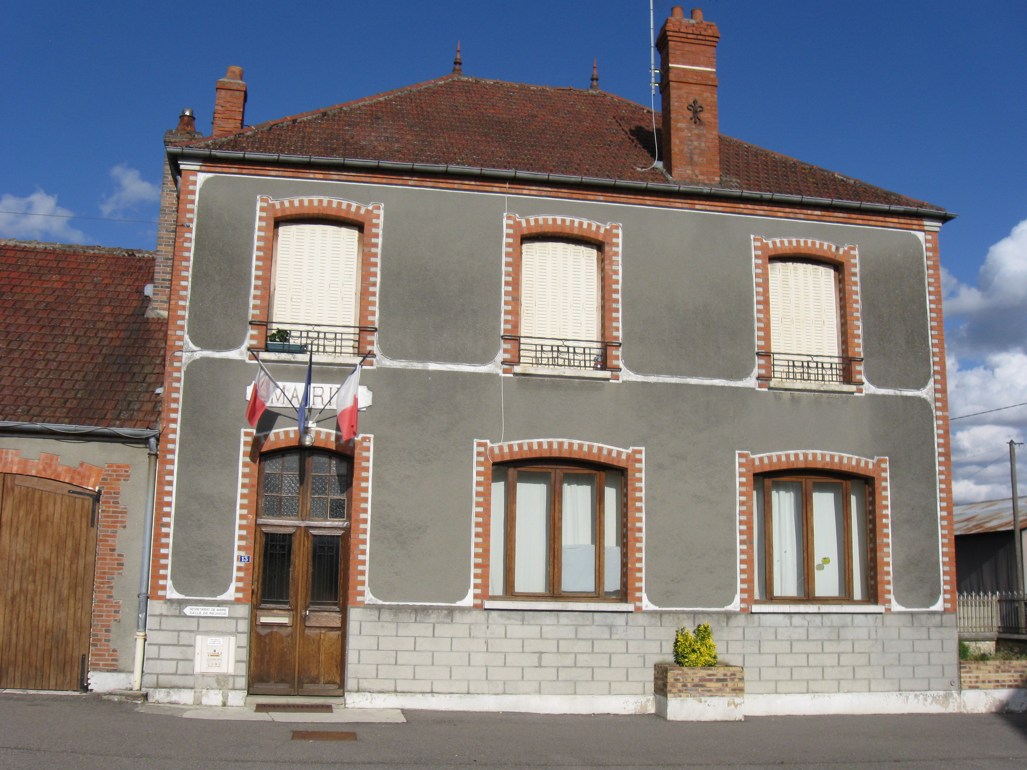 Mairie de Jutigny. (département de la Seine et Marne, région Île-de-France).